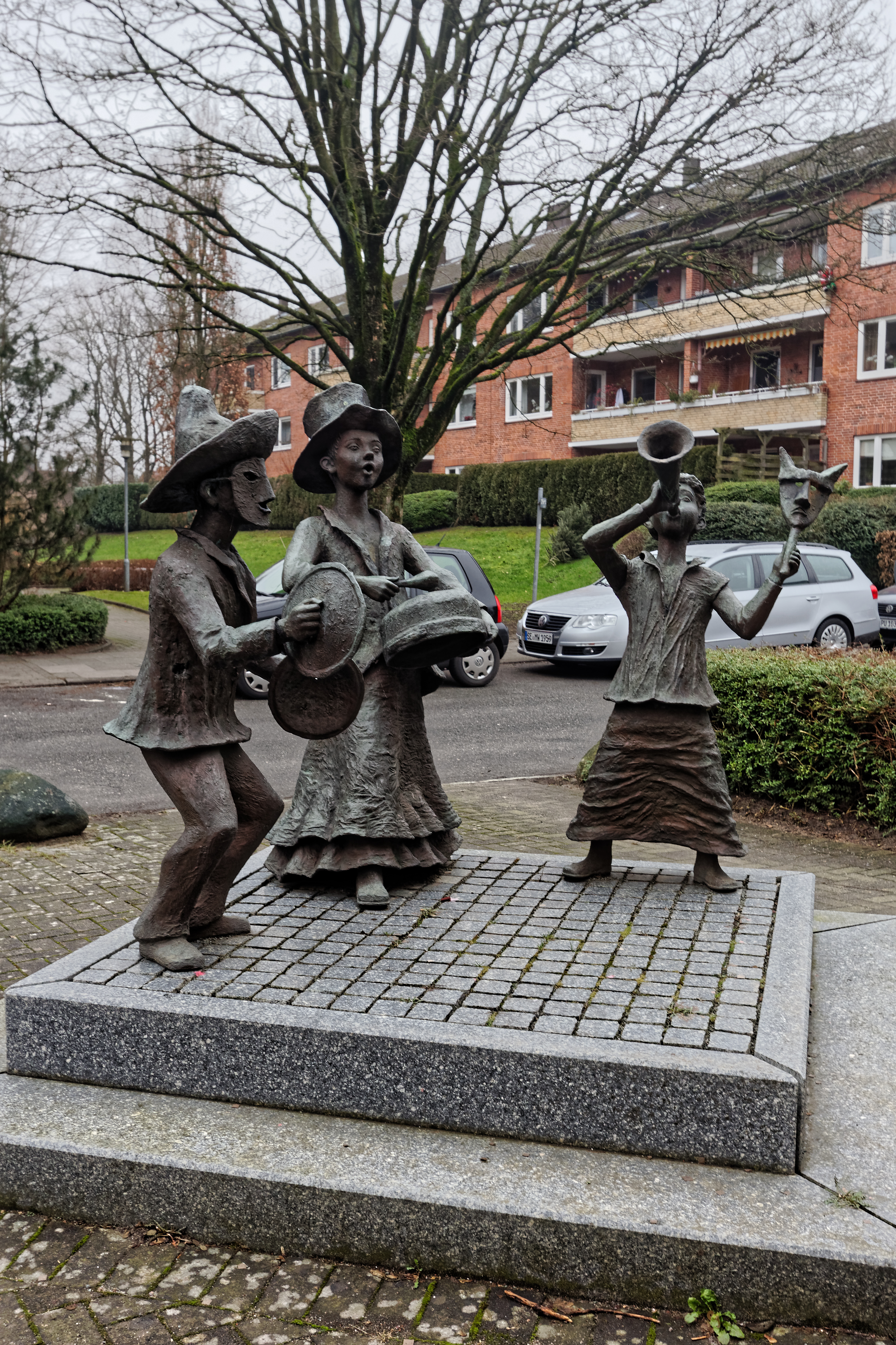 Skulptur "Rummelpottlaufen" von Gerhard Brandes in Hamburg-Bramfeld